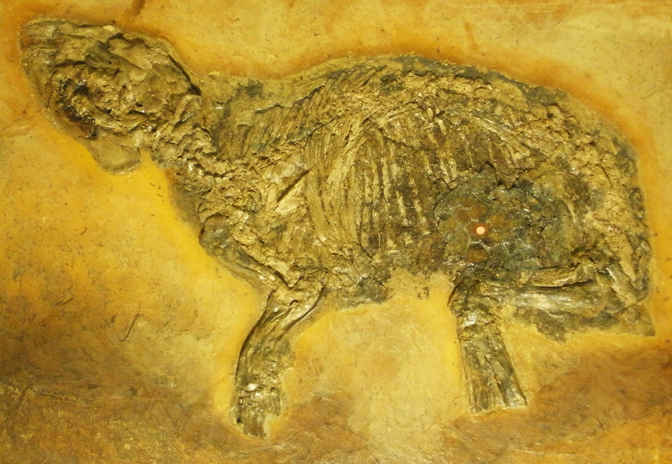 Fossil of Propalaeotherium, an extinct mammal- Took the photo at Senckenberg Museum of Frankfurt